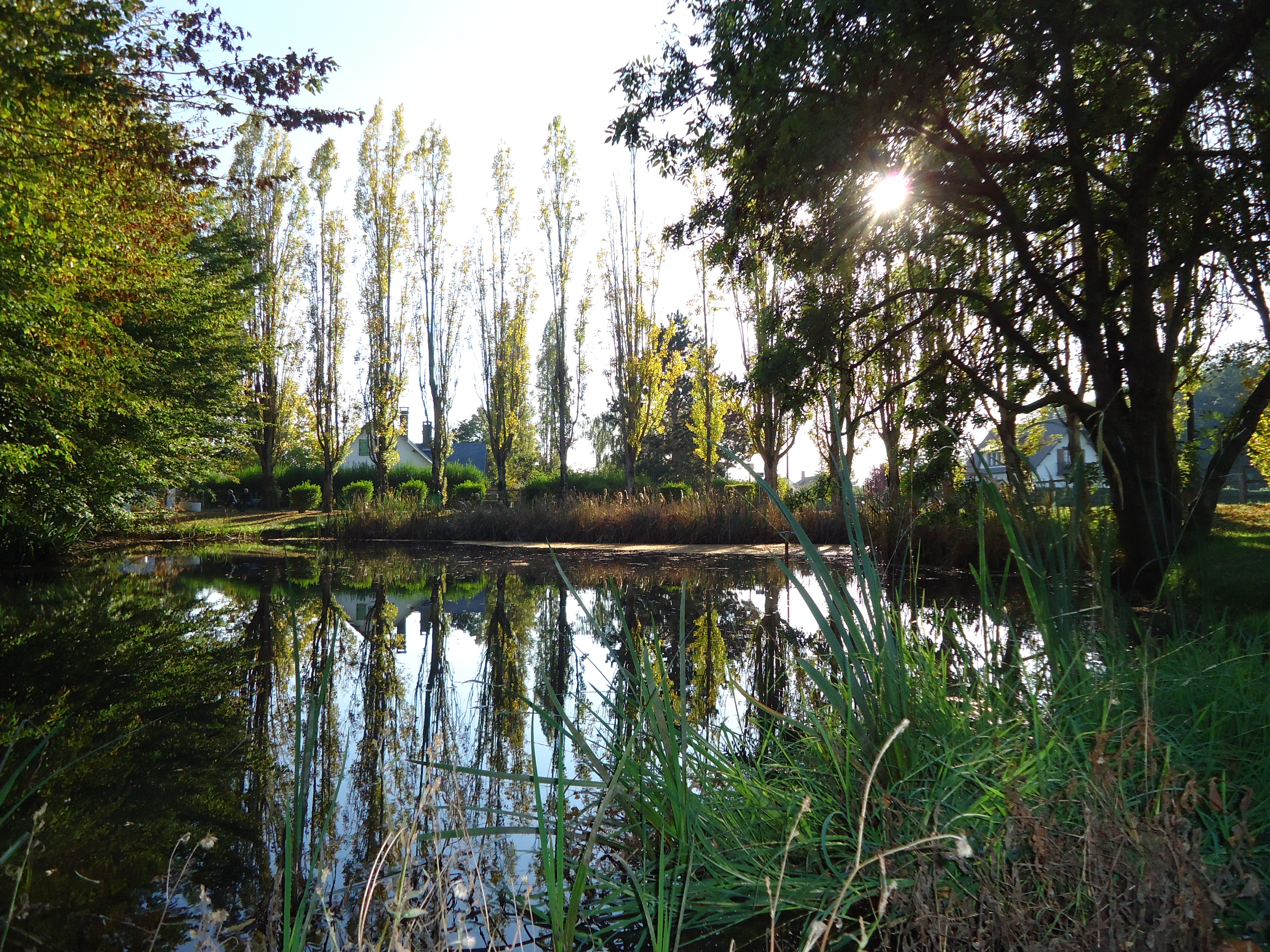 HUEST - Mare de la rue de Fauville dite "Mare des peupliers"